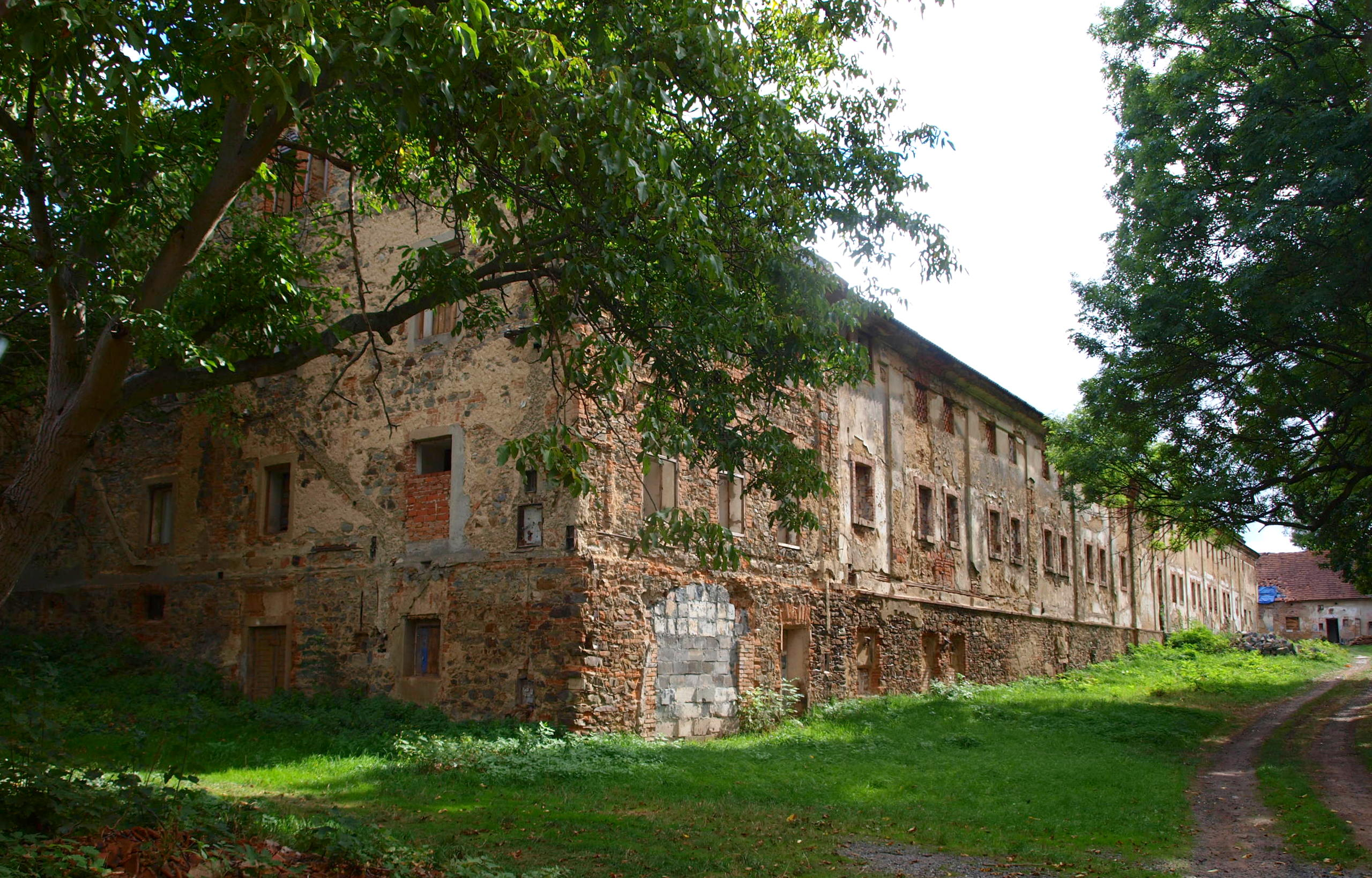 Praha-Petrovice zámek